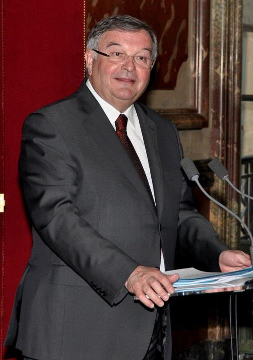 Michel Mercier lors d'une remise de l'ordre national du mérite.